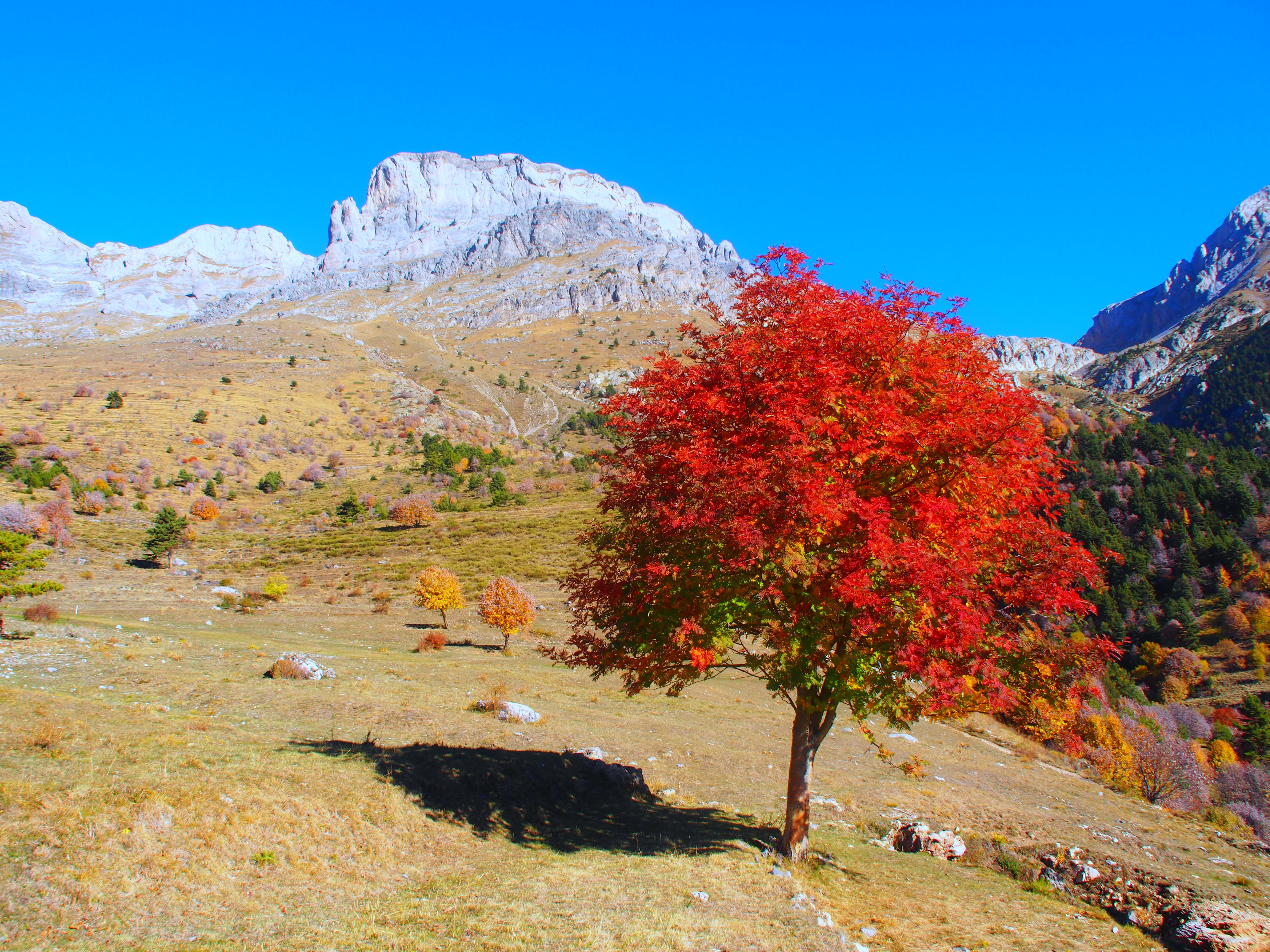 Parco naturale del Marguareis (Q1533952)